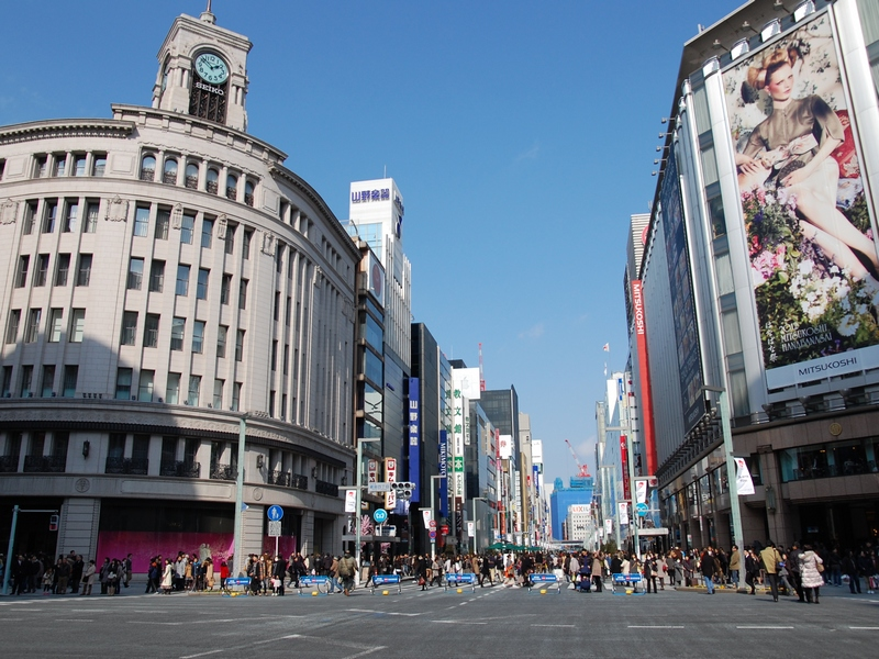 東京都中央区銀座の4丁目交差点。画角の左側の建物が「和光ビル」、右側は百貨店の「三越」 location: Chuo caption: Ginza 4th district of a town（銀座4丁目交差点）